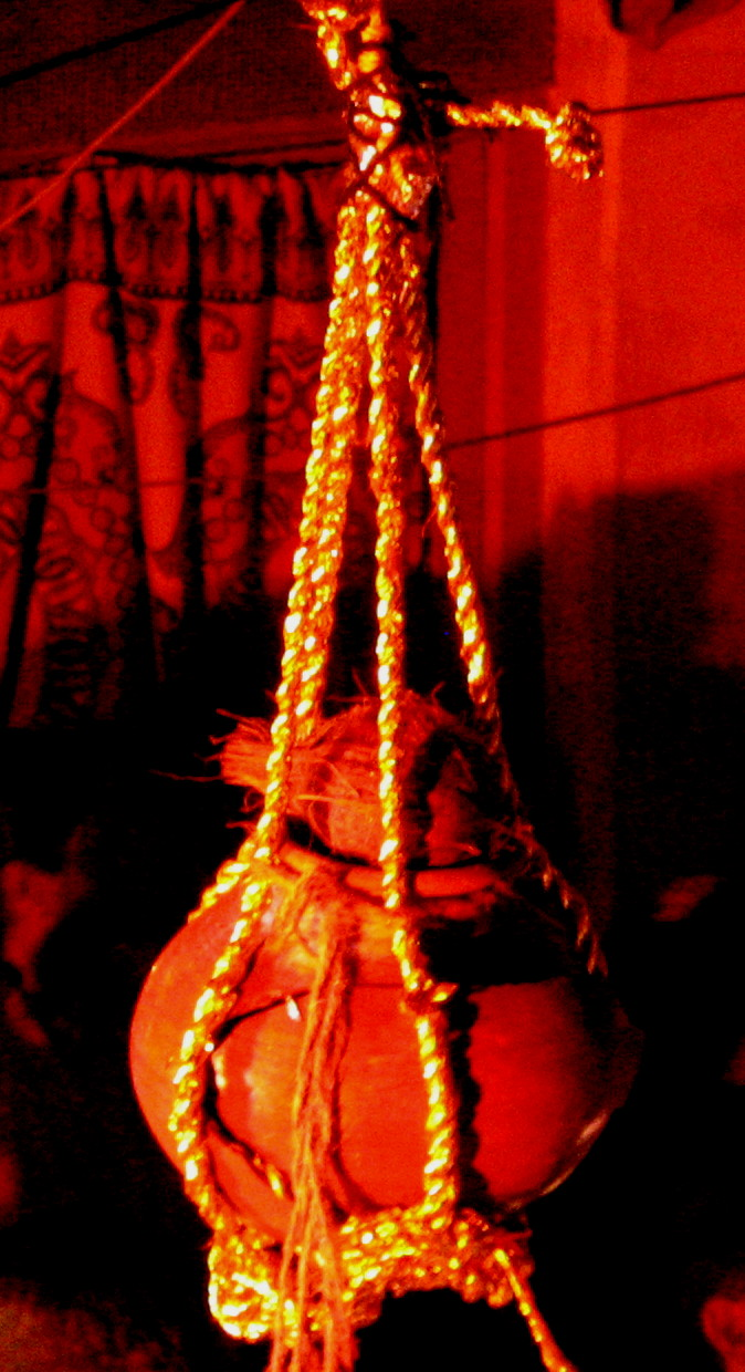 Mumbai, India